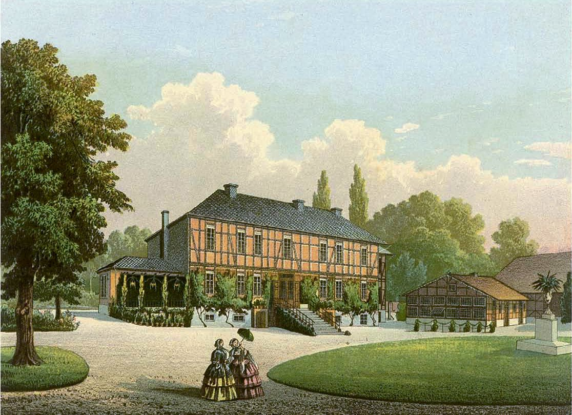 Rittergut Beetzendorf, Apenburger Hof, Kreis Salzwedel, Provinz Sachsen, Lithografie aus dem 19. Jahrhundert